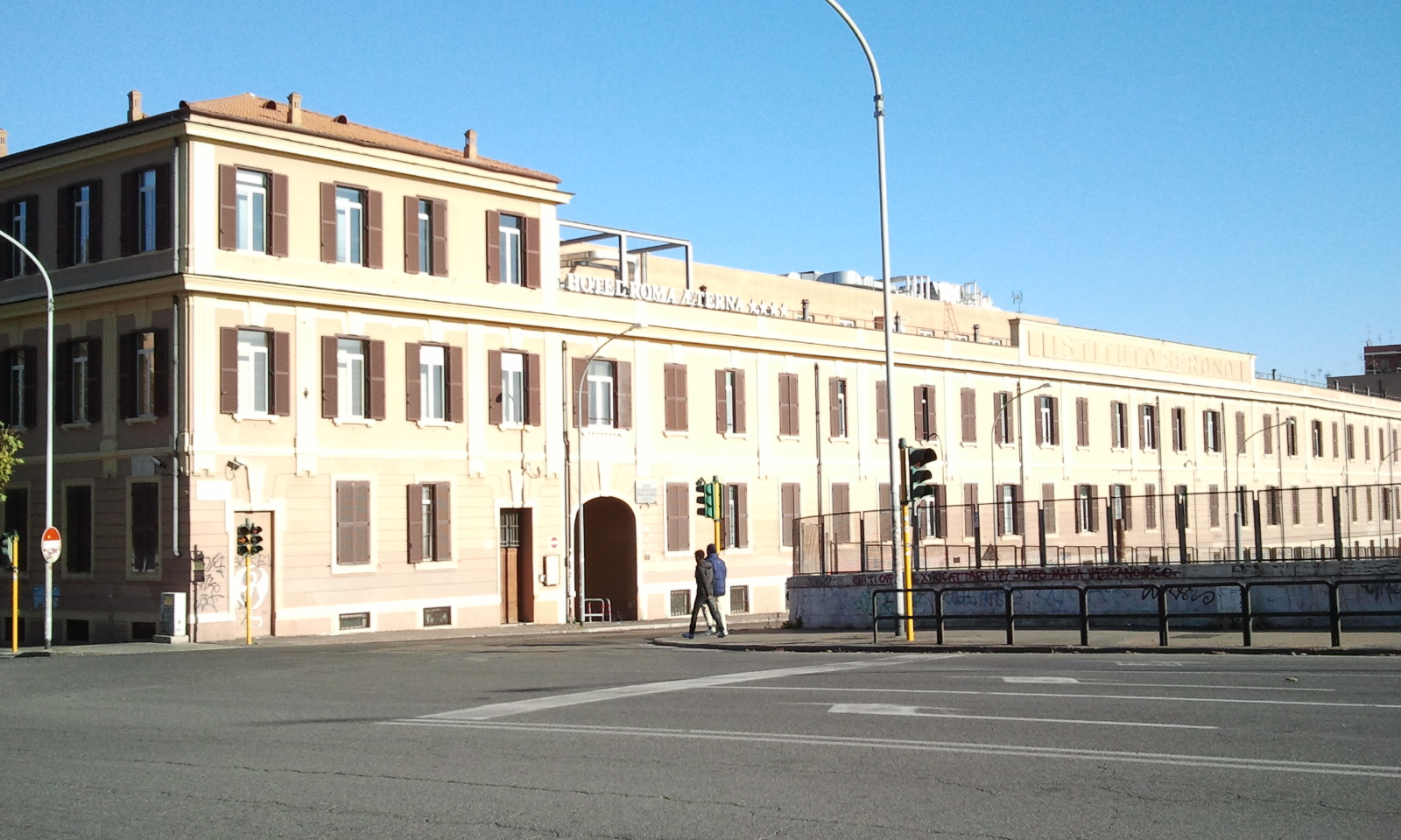 L'Istituto farmaceutico Serono convertito in hotel.